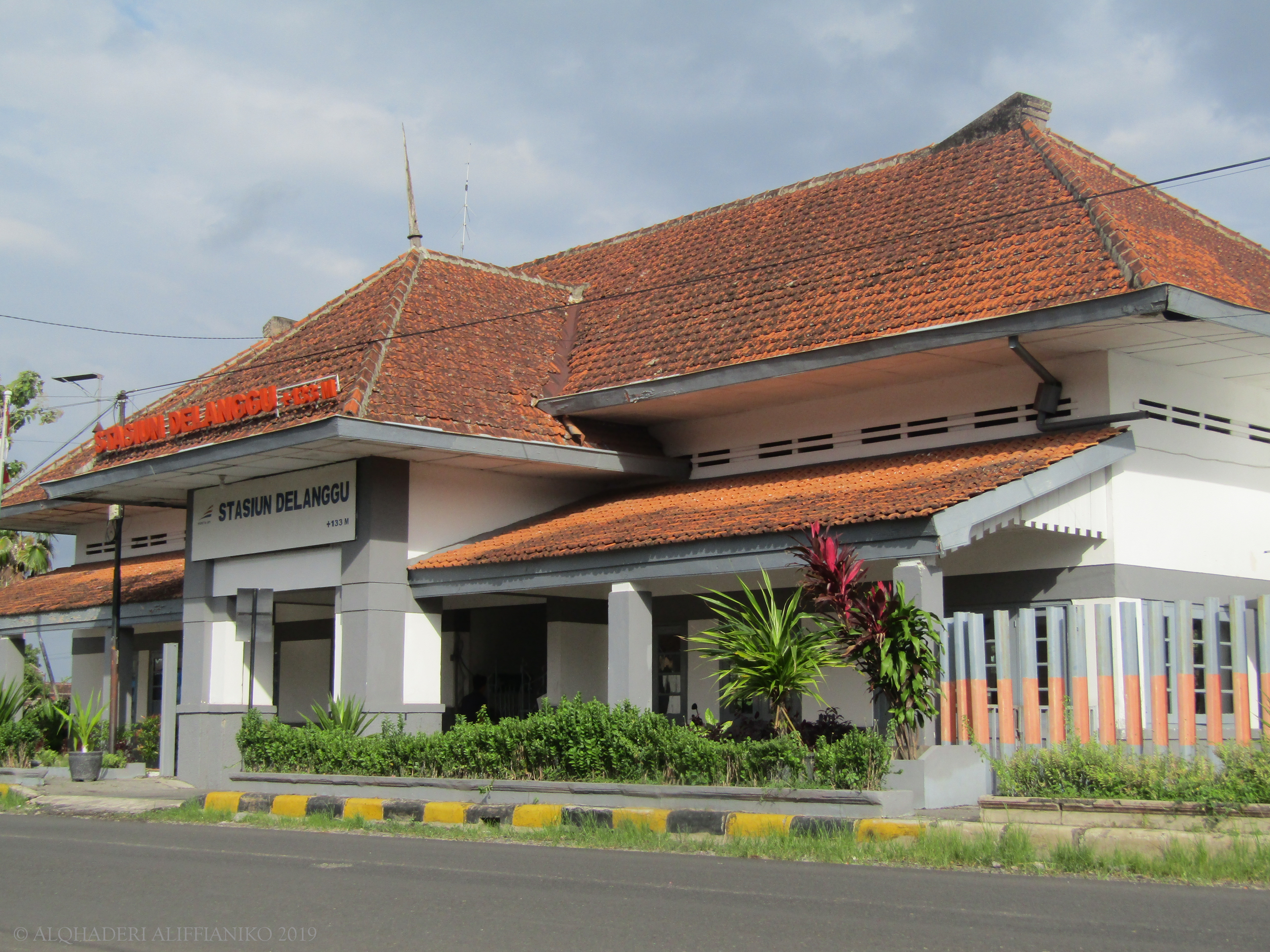 Tampak depan Stasiun Delanggu, 2019